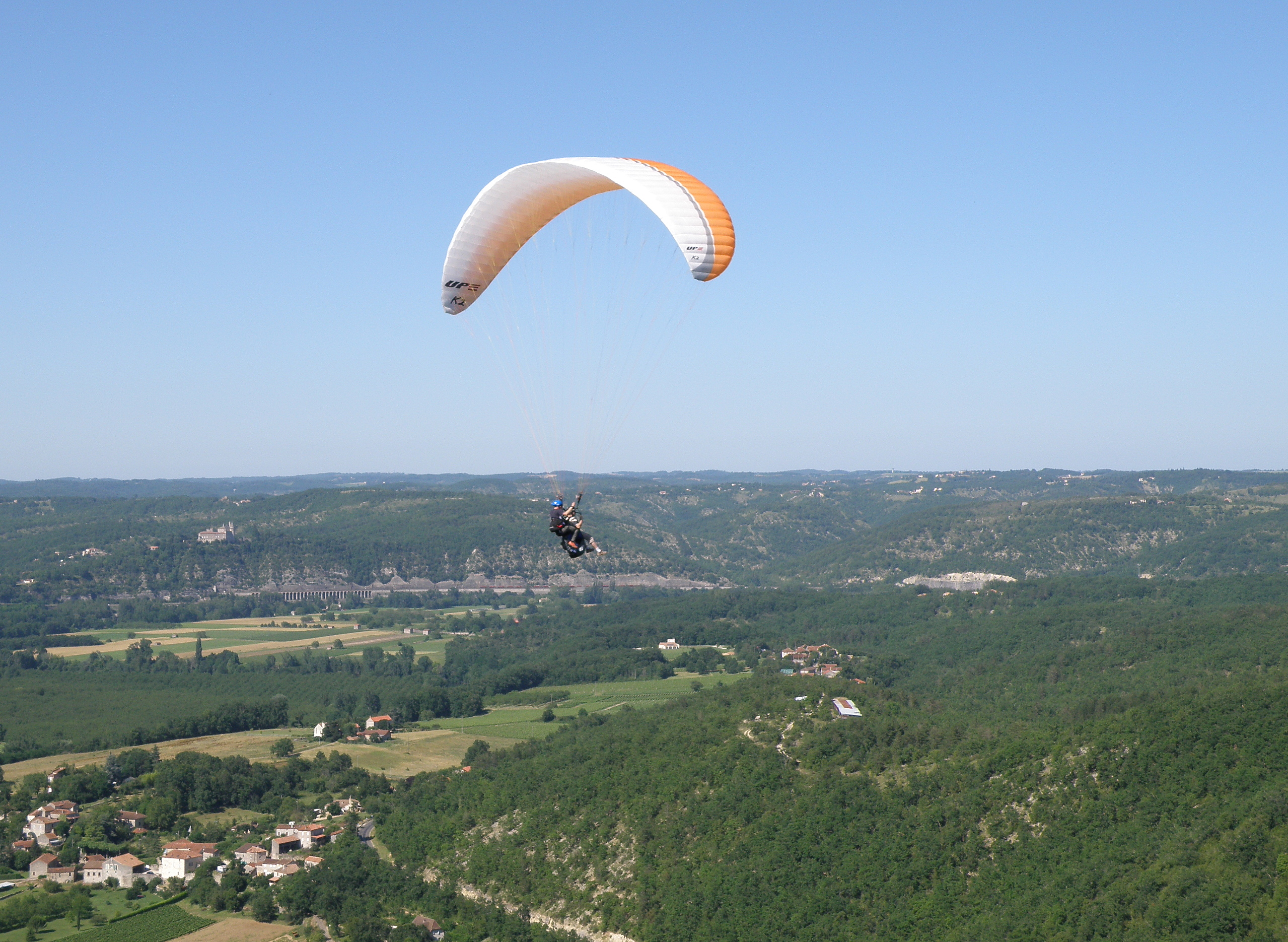 Douelle, commune et village situés sur la rive gauche du Lot, sept km environ (à vol d’oiseau) à l’ouest de Cahors, dans le département du Lot, France (région Midi-Pyrénées). Photographie prise depuis l’aire d’envol de parapente sur la cévenne de Douelle (alt. 306 m), au sud-est du bourg, lequel n’est pas visible ici. Un parapente biplace vient de prendre son envol. Le groupe de maisons en bas à gauche est le village de Flaynac (commune de Pradines). Dans le lointain à gauche, au sommet d'une longue falaise grise (au pied de laquelle coule le Lot), on remarque la masse claire du château de Mercuès. Les arcades au bas de cette même falaise supportent la ligne ferroviaire Paris-Toulouse. Coup d'œil vers le nord-nord-est.